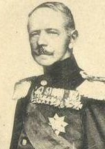 Carl Alexander von Sachsen-Weimar-Eisenach (1818-1901)